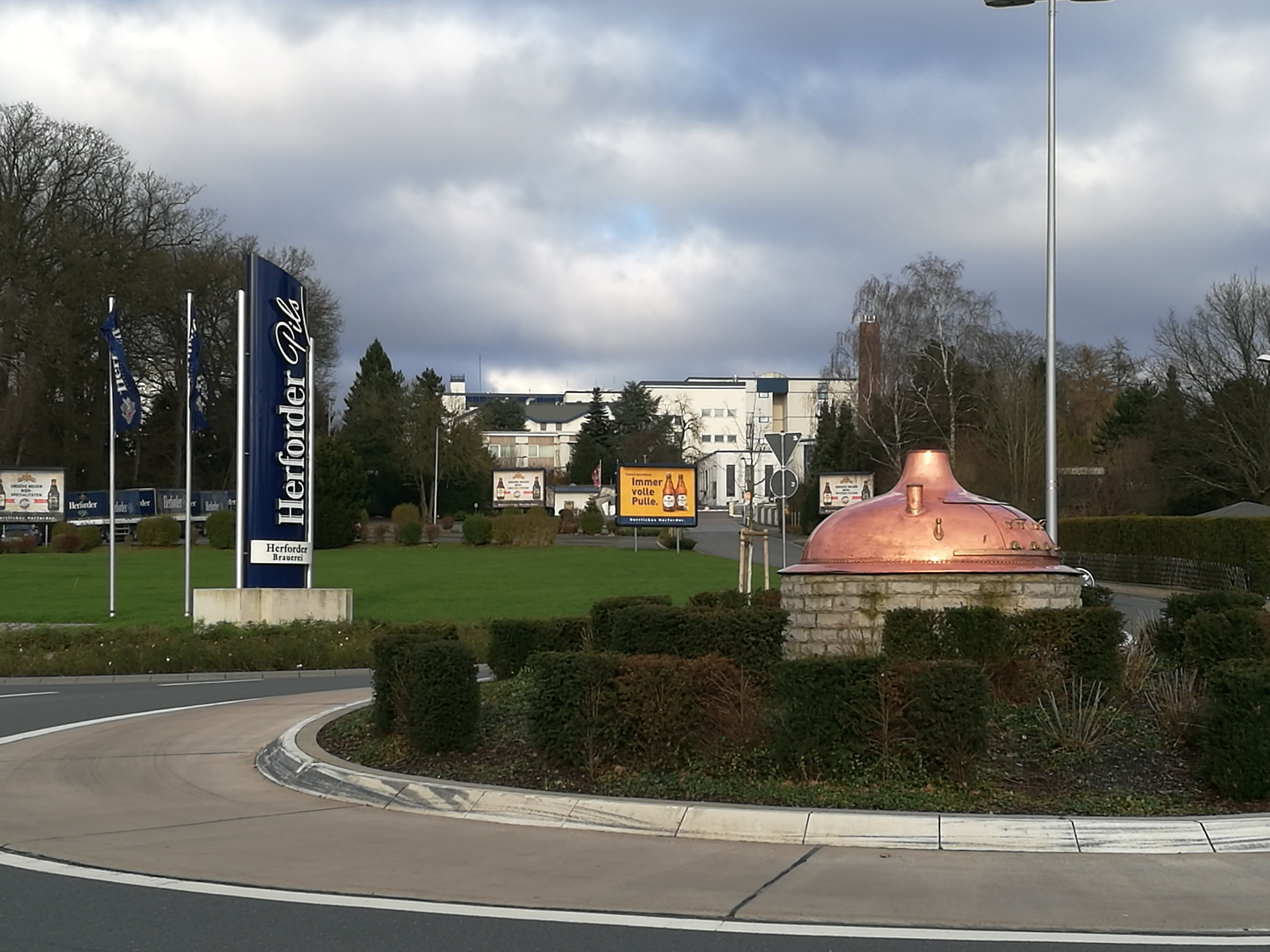 Herforder Brauerei im Vordergrund die Verkehrsinsel mit Kupferkessel